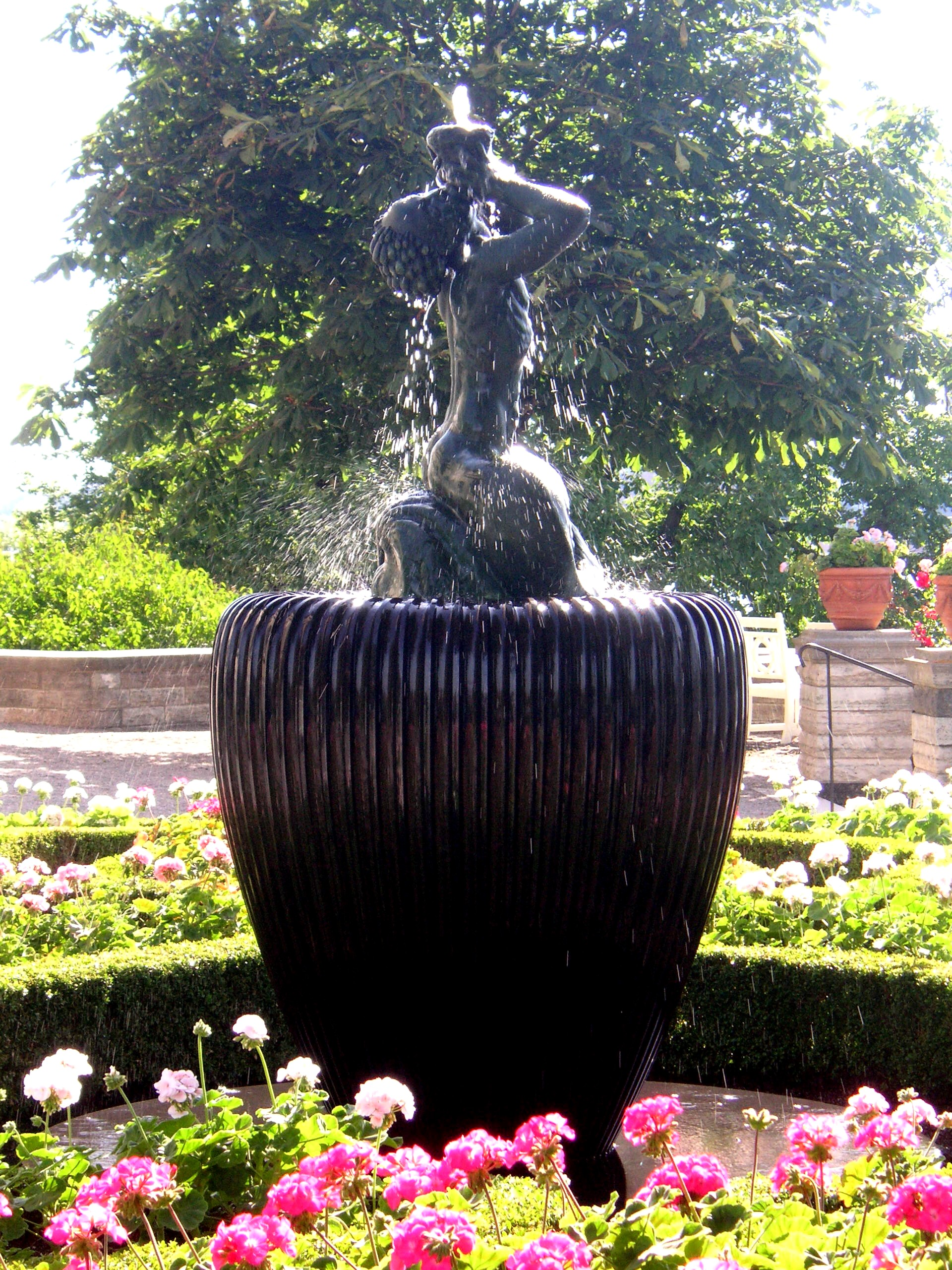 Carl Milles skulptur "Triton" 1916